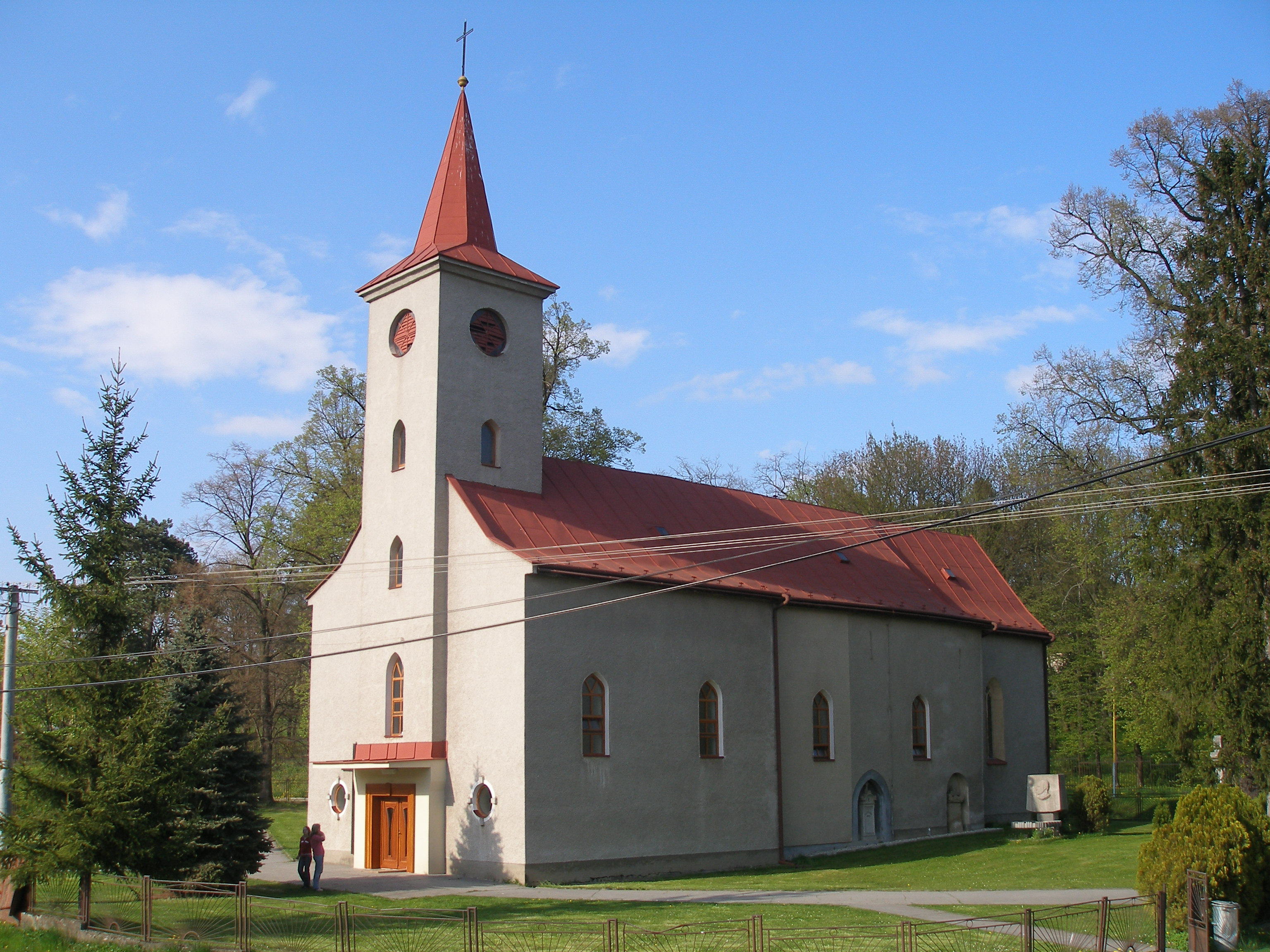 Obec Župčany okres Prešov región Šariš